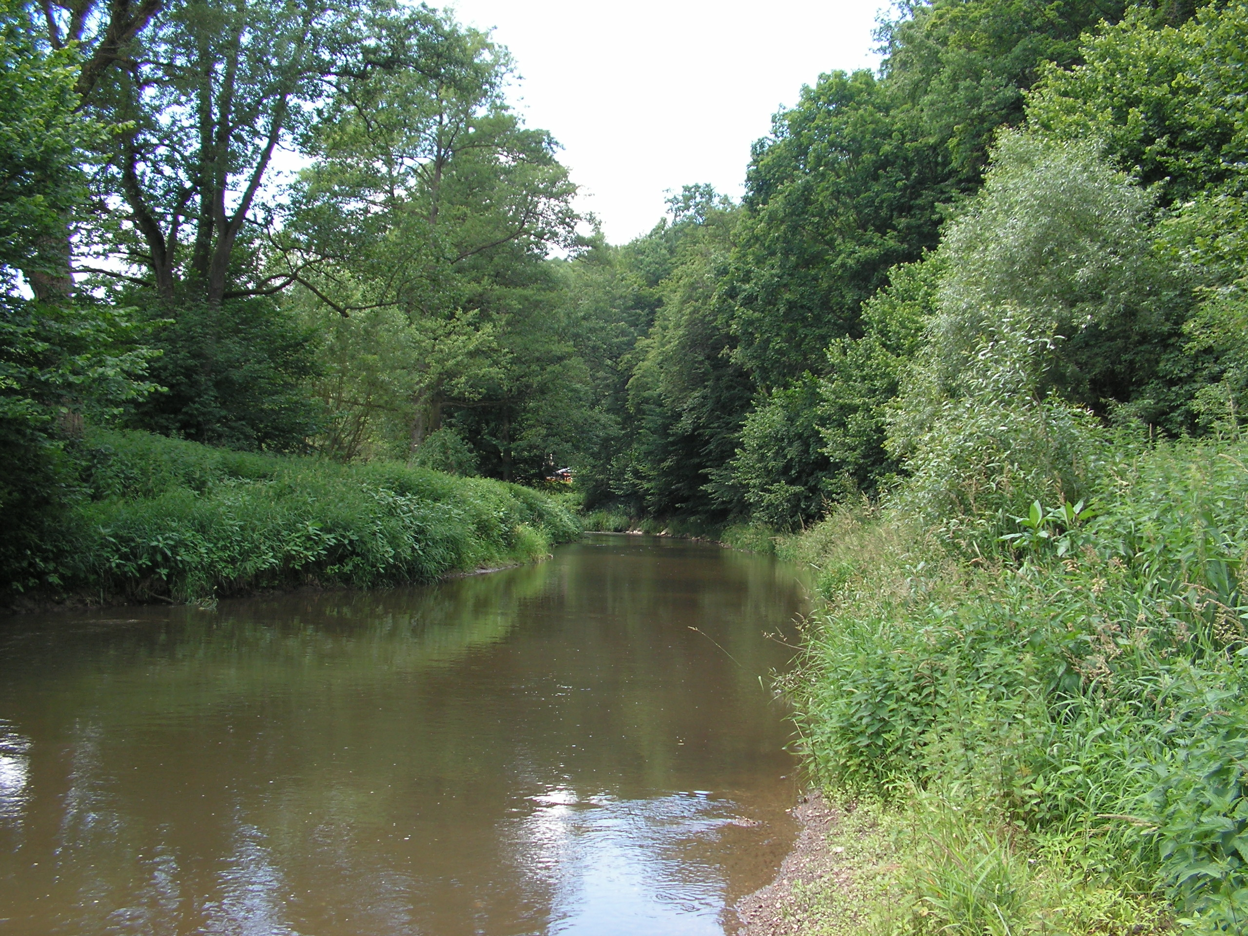 Vlašimská Blanice u ústí do Sázavy severozápadně od Soběšína.